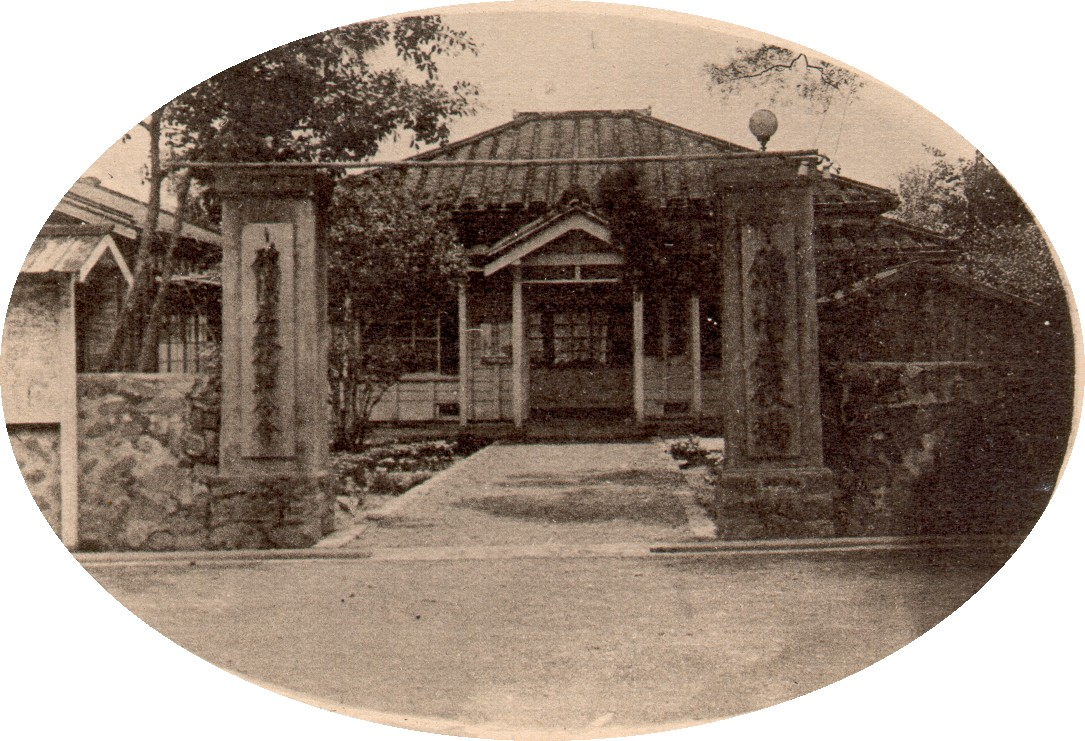 中文（台灣）: 礁溪庄役場為礁溪鄉公所前身